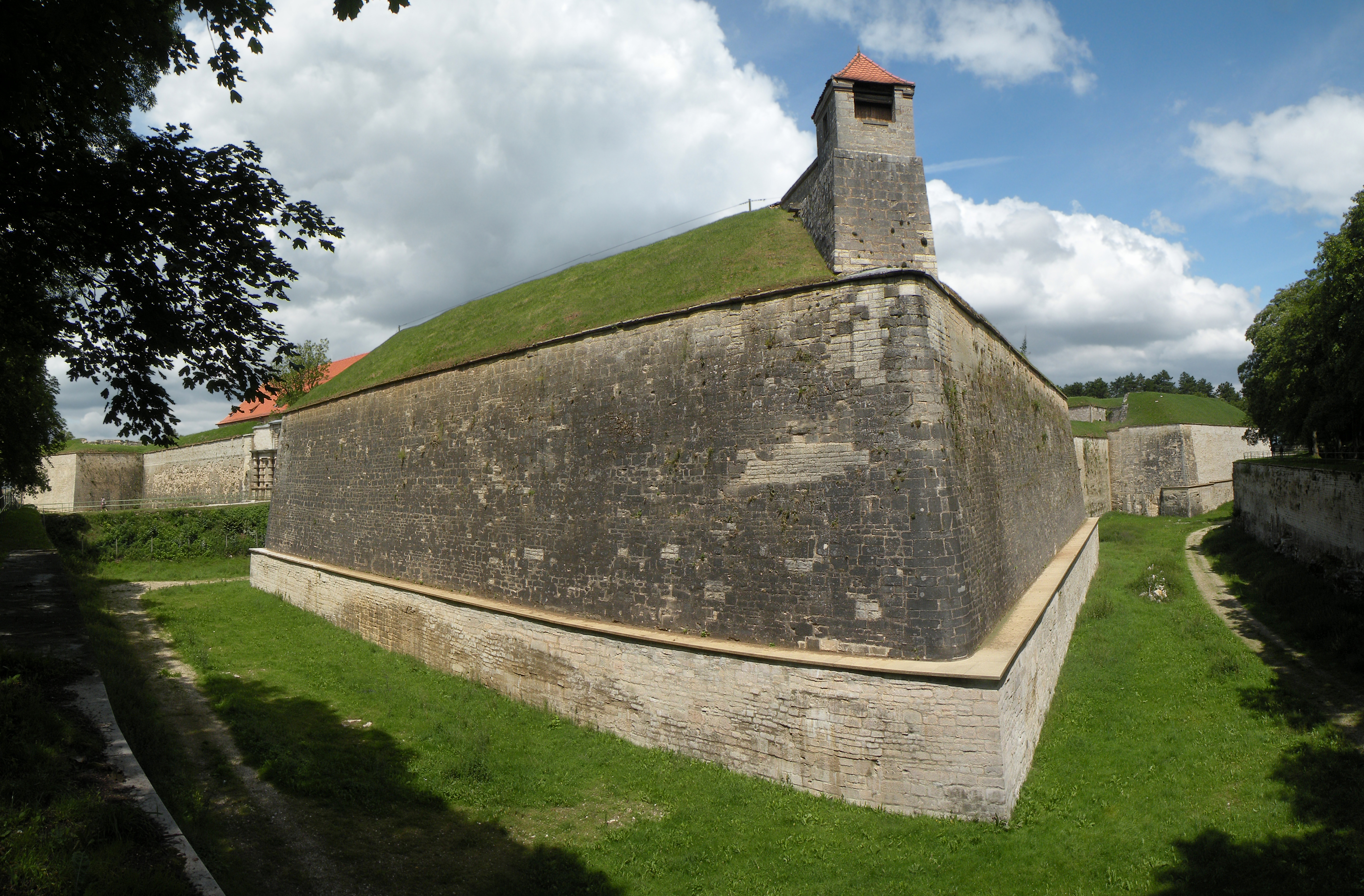 Castle_Wülzburg, Bastion